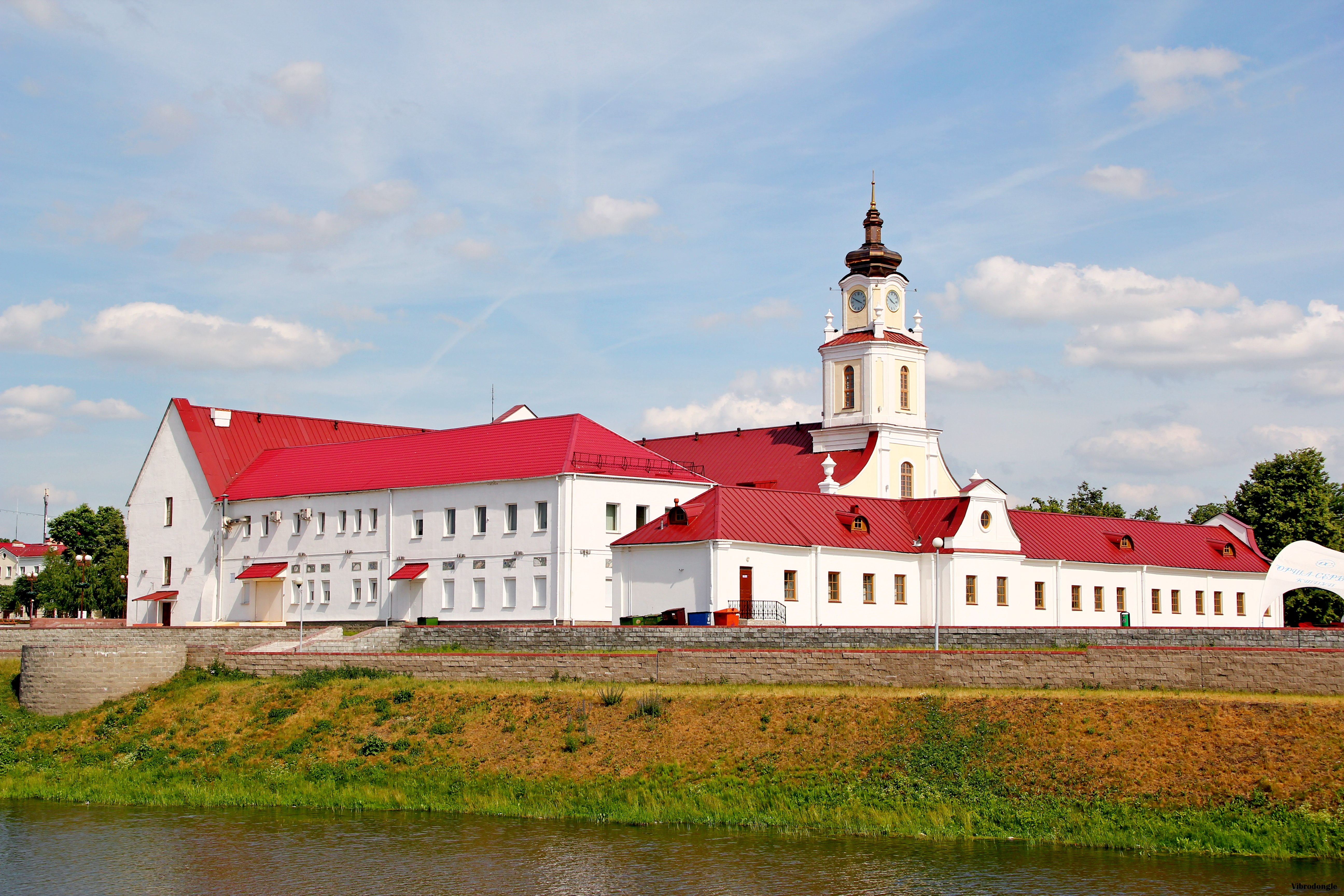 Орша. Иезуитский коллегиум